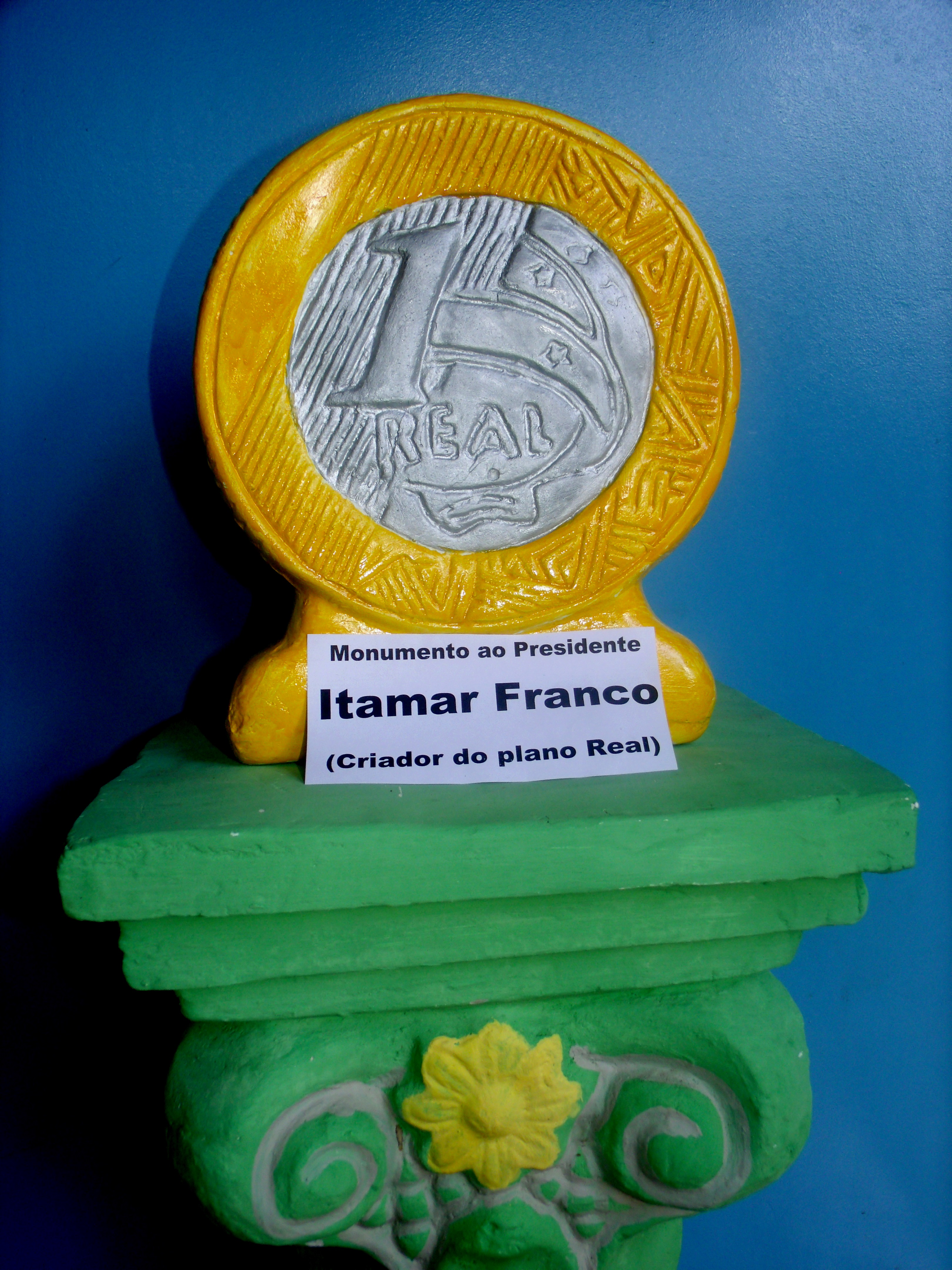 Pequeno monumento ao Presidente Itamar Franco, moeda de um Real em gesso grandona.